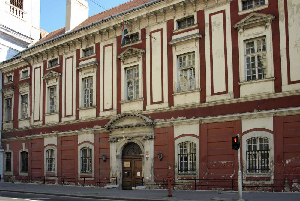 A volt Erzsébet-apácák kolostora (a képről a falfirkák el lettek távolítva). Budapest, I. ker., Fő utca (a Batthyány térhez közel)